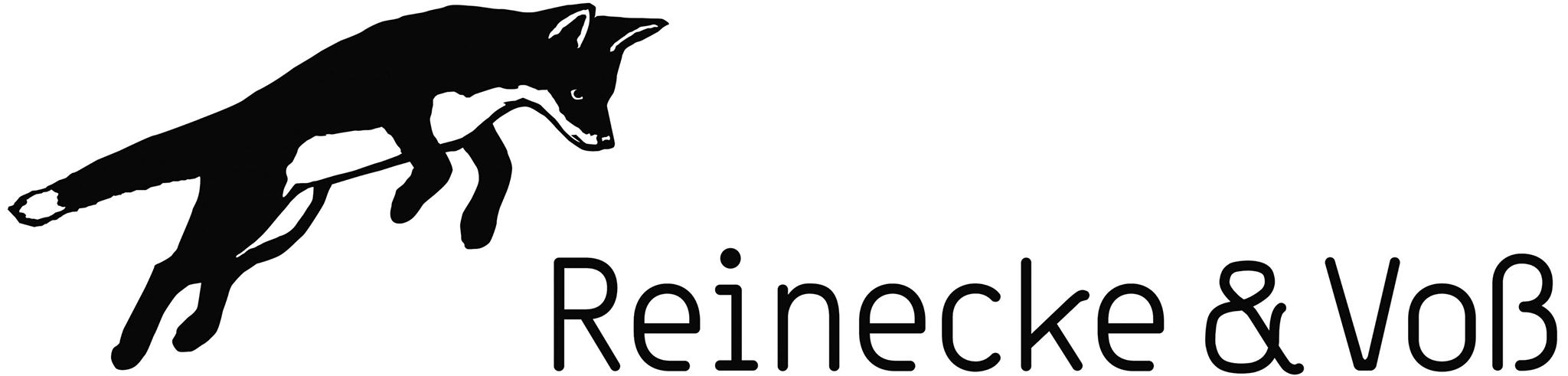 Logo des Verlags Reinecke & Voß